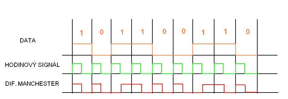 První náčrt diferenciálního kódování Manchester